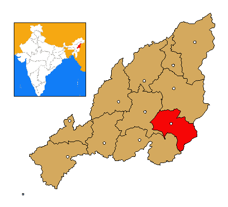 Mapa de localización del distrito